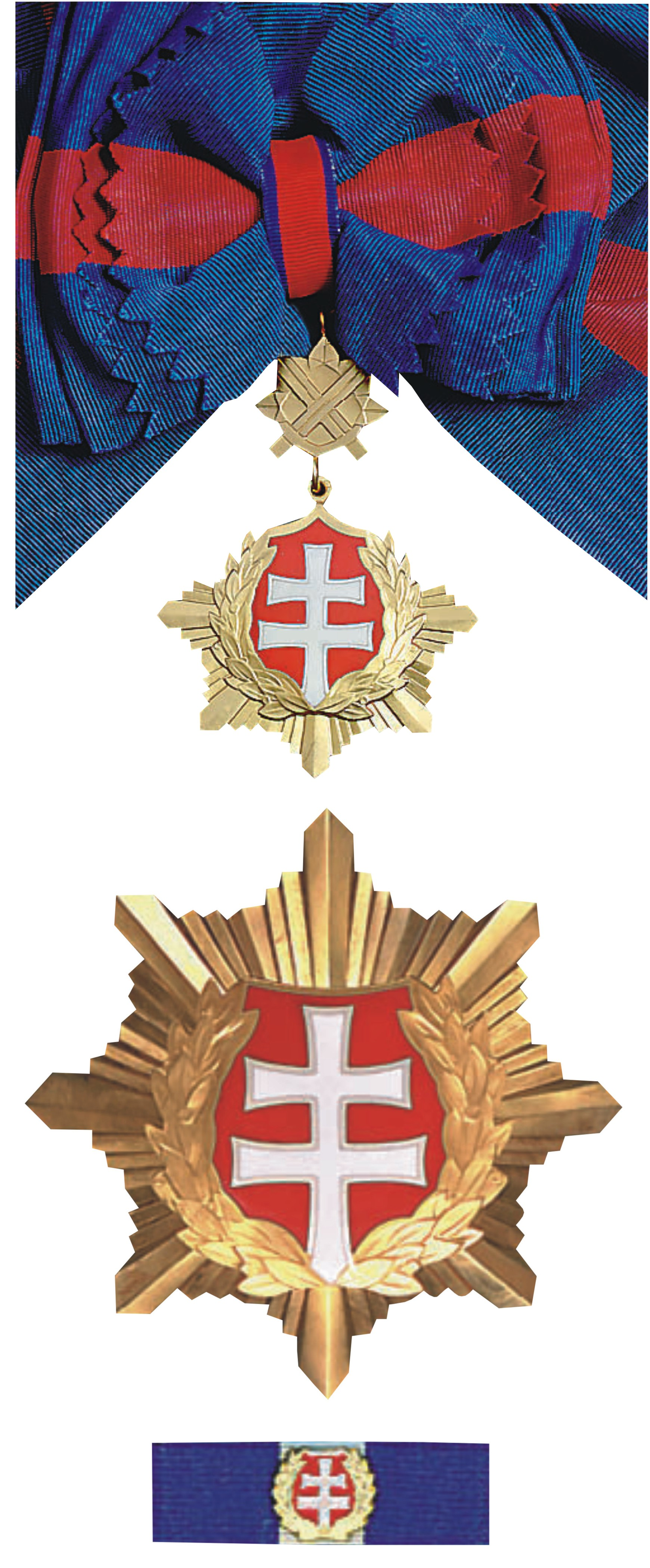 Štátne významenanie Slovenskej republiky Rad bieleho dvojkríža 1. triedy vojenského druhu. Insígnie vojenského druhu I. triedy radu tvorí: radový kríž, veľká radová stuha, radová hviezda, radová stužka a radová rozeta. Radový kríž má priemer 65 mm, je razený zo striebra, pozlátený. Kríž vojenského druhu má pozlátený záves tvorený tromi plastickými lipovými listami na štylizovanej podložke v strede s dvoma prekríženými mečmi. Veľká radová stuha je hodvábna, modro-červeno-modrá, s pomerom farieb 3/8:2/8:3/8, dlhá 180 cm, široká 90 mm. Veľká radová stuha sa nosí cez pravé plece k ľavému boku. V mieste, kde sa jej konce križujú na ľavom boku, je pripevnená dvojitá ozdobná mašľa. Radová hviezda má priemer 100 mm, je razená zo striebra, pozlátená, v priereze mierne oble profilovaná. Osemcípu hviezdu tvoria plastické lúče,z ktorých najväčší vytvára cíp hviezdy.